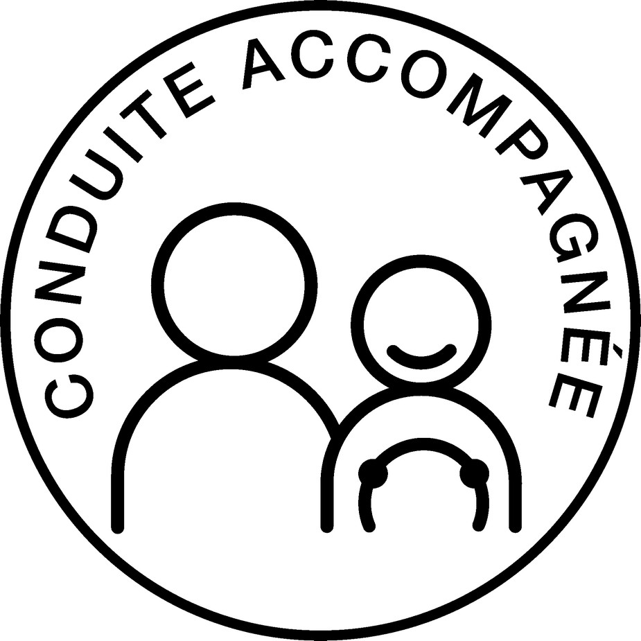 Logo de la conduite accompagnée, accollé derrière les véhicules.